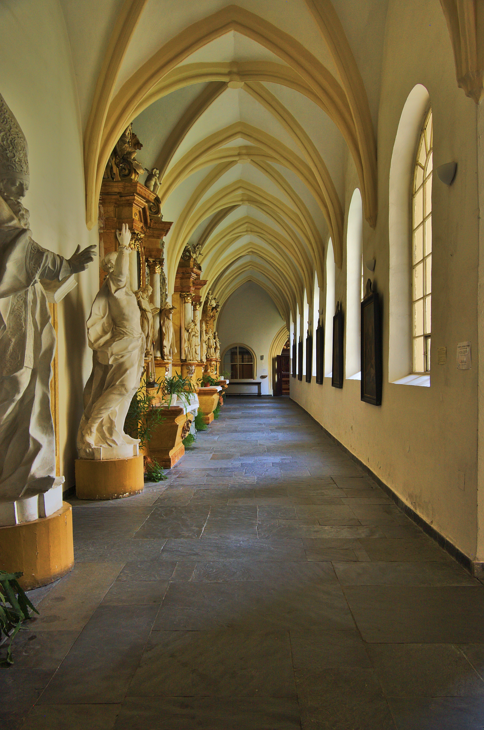 Křížová chodba, kostel svatého Michaela archanděla, Olomouc